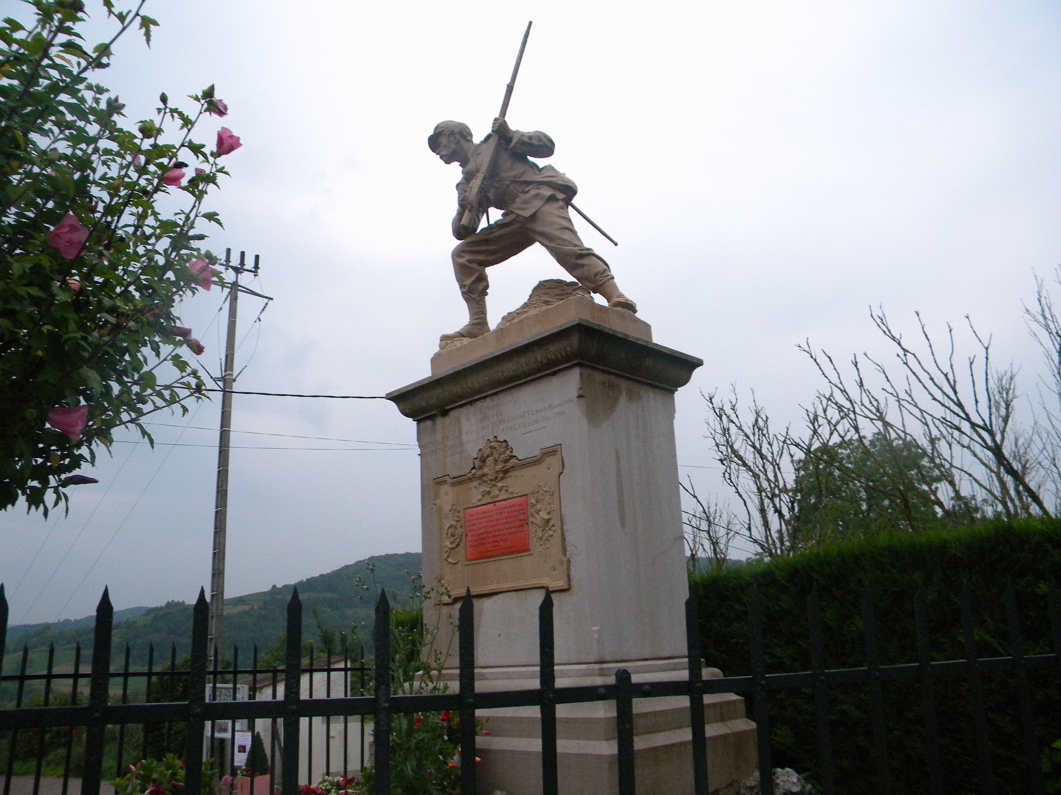 Monument 1870